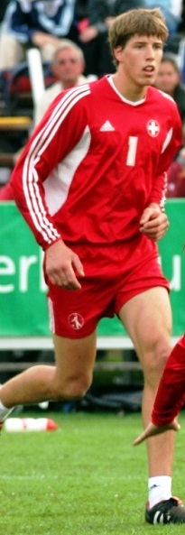 Faustball-Spieler Cyrill Schreiber aus der Schweiz. (Bildausschnitt aus einem grösseren Bild)